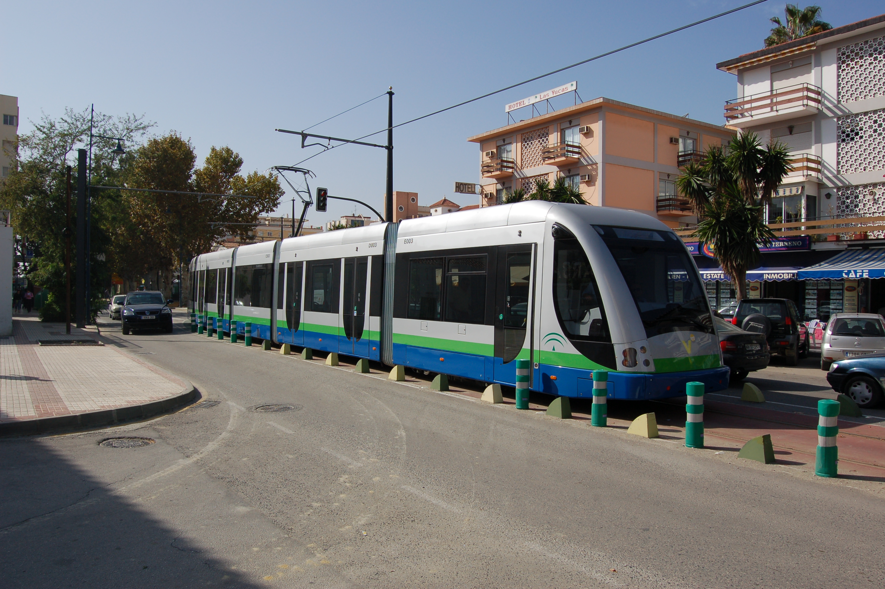 Trikk fra Torre del Mar til Velez-Malaga